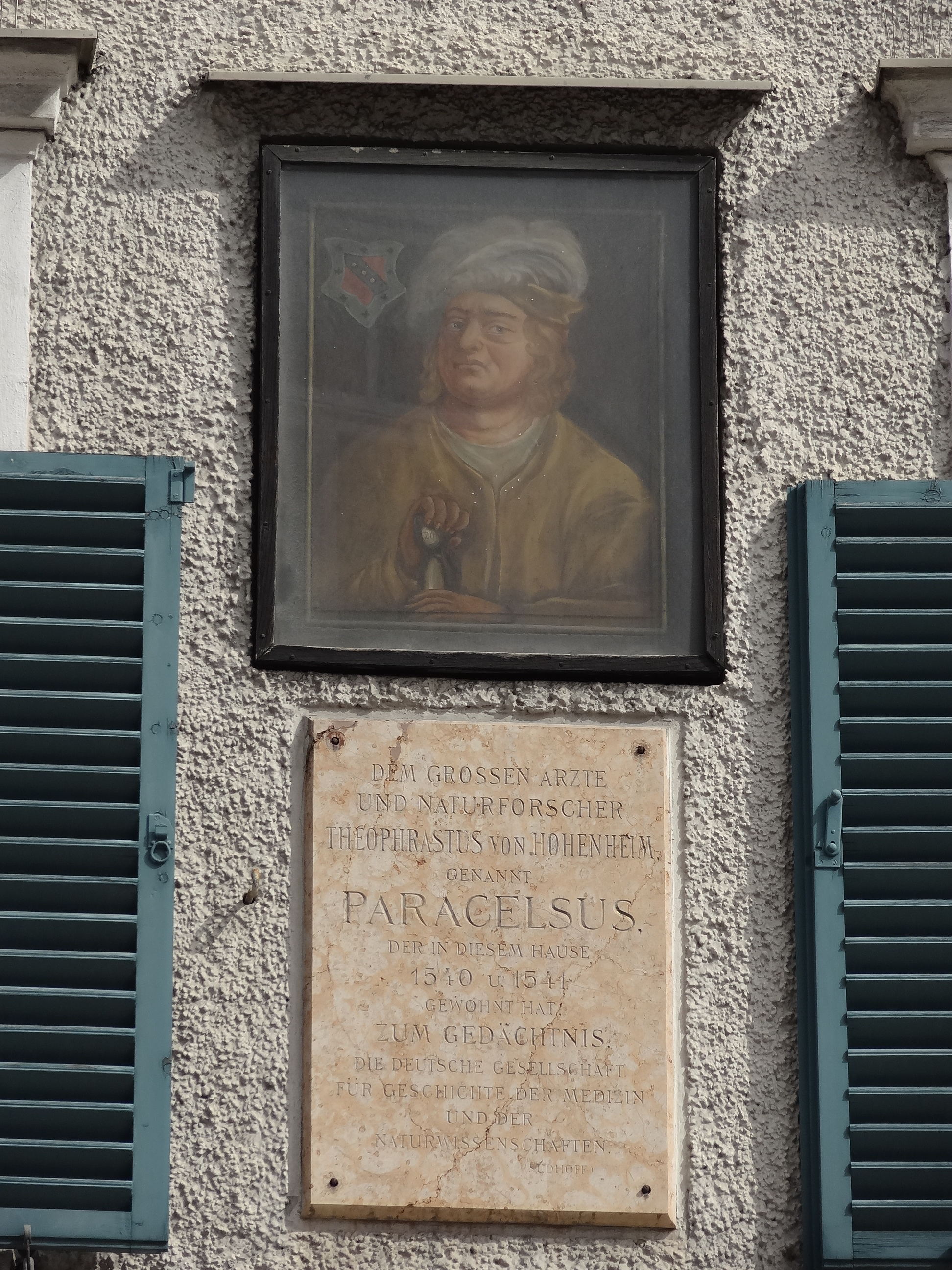 Platzl 3, 5020 Salzburg